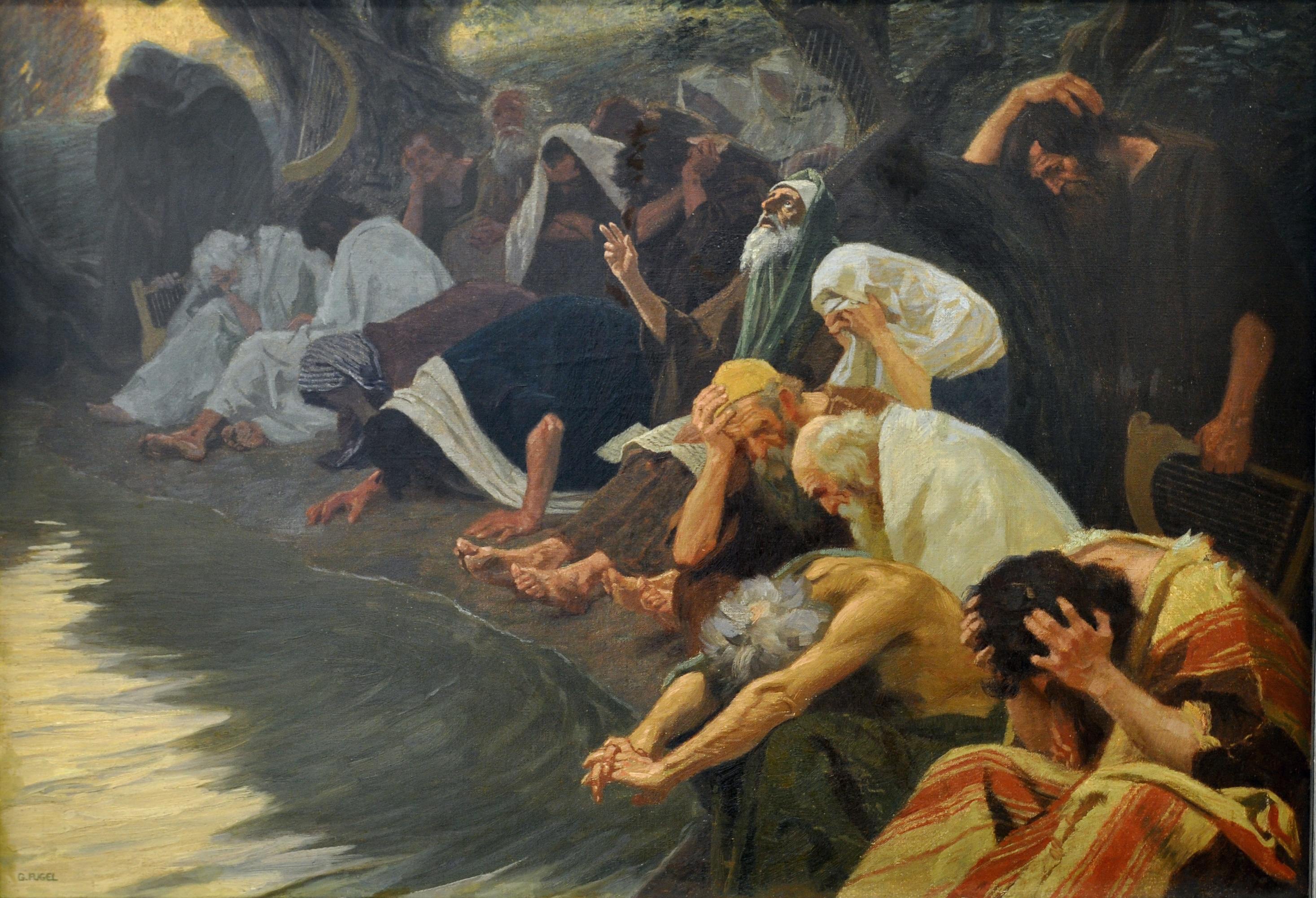 An den Wassern Babylons, Diözesanmuseum Freising